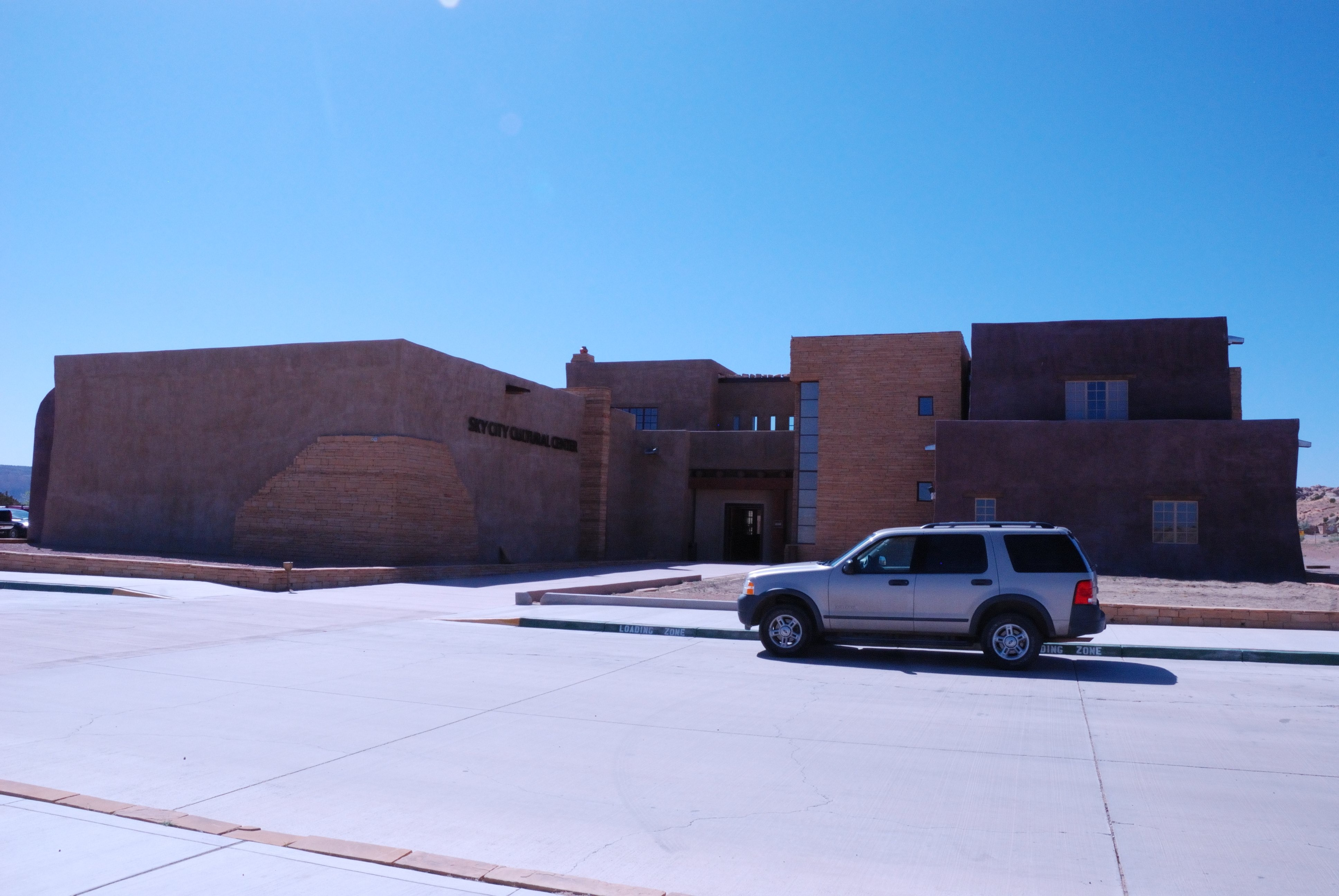 Sky City Cultural Center, Acoma Pueblo, Nex Mexico, USA